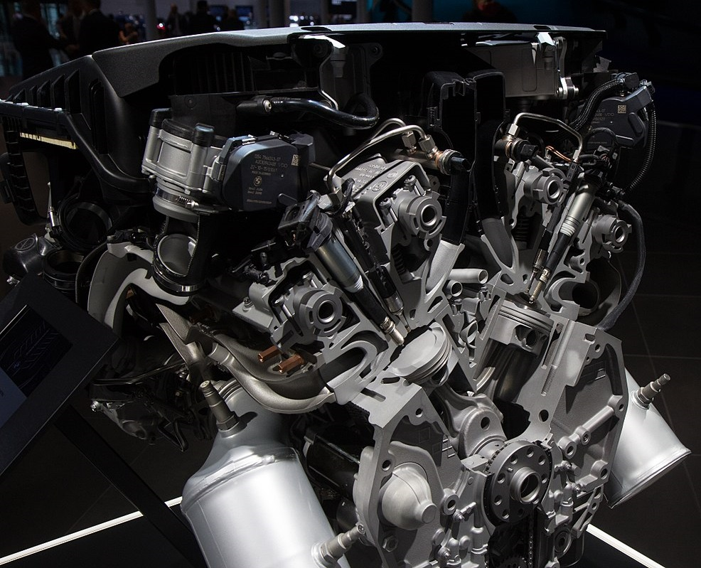 BMW N74